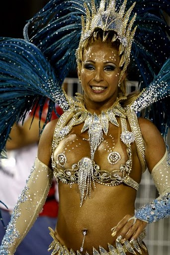 Valeska Popozuda no Carnaval 2010.